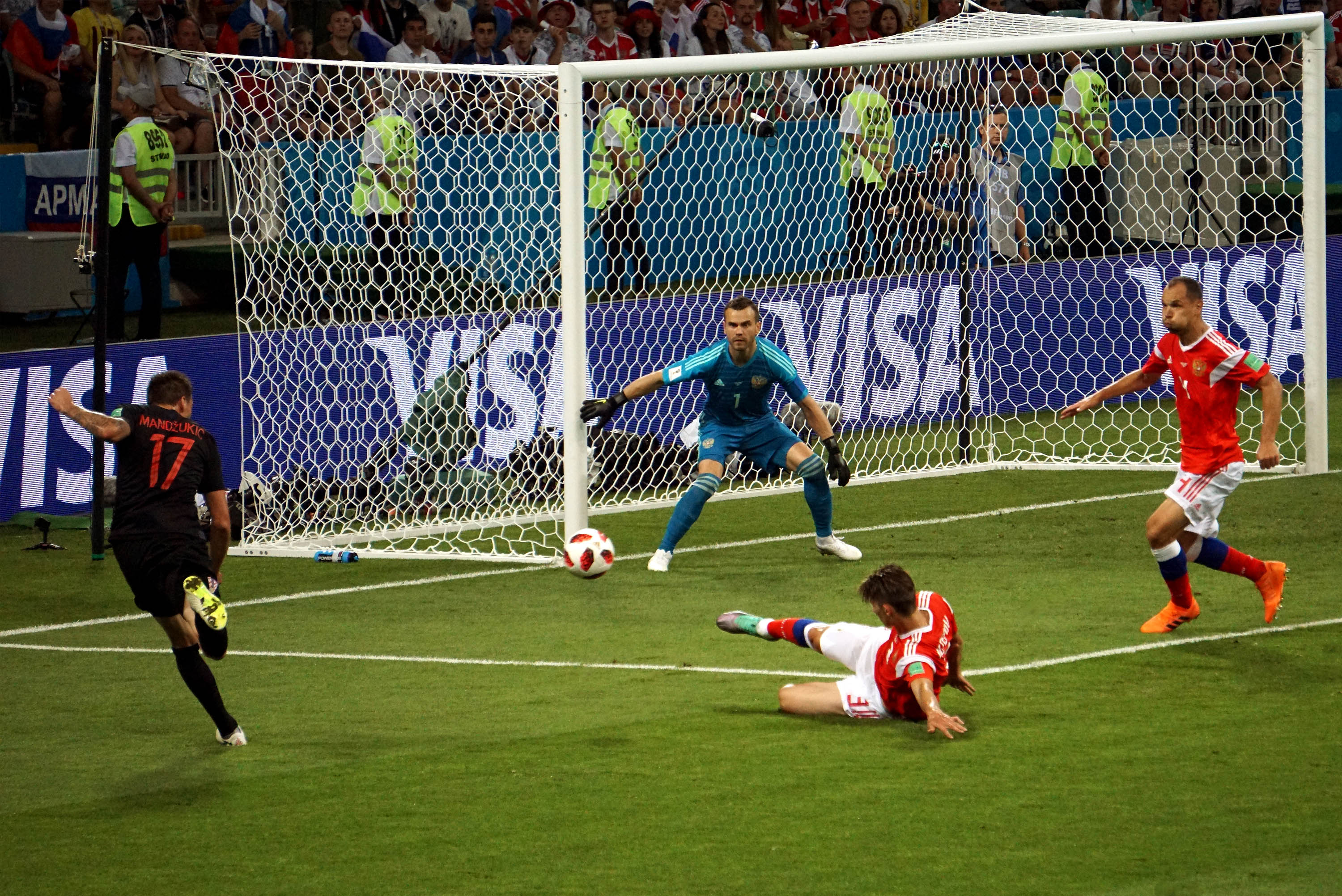 7 июля 2018 года сборная Хорватии обыграла сборную России со счётом 2:2 (4:3) по пенальти на ЧМ-2018 на стадионе «Фишт». На 40-й минуте Андрей Крамарич сравнял счёт, а ассистировал ему Марио Манджукич.